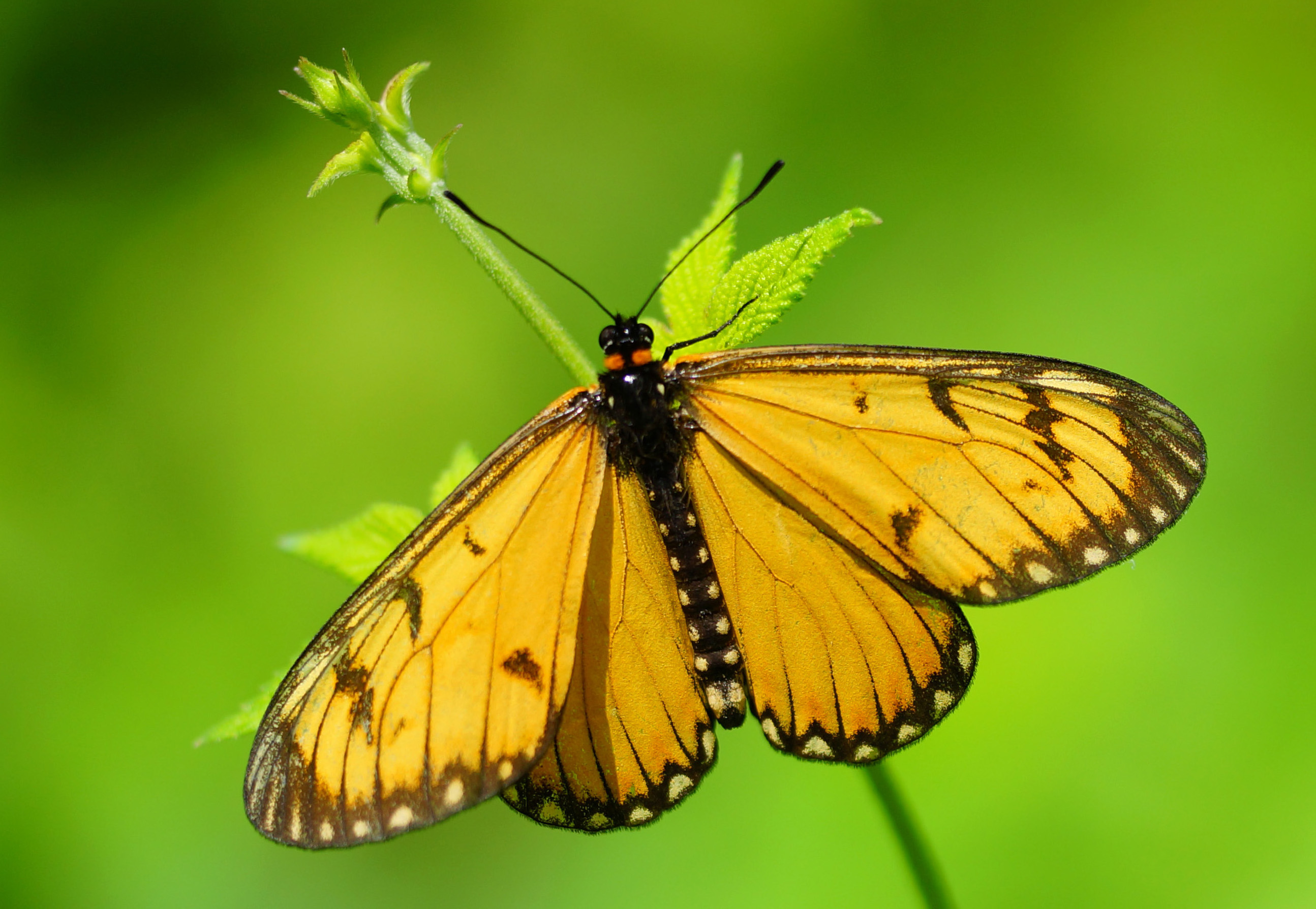 苧麻珍蝶 Acraea issoria formosana